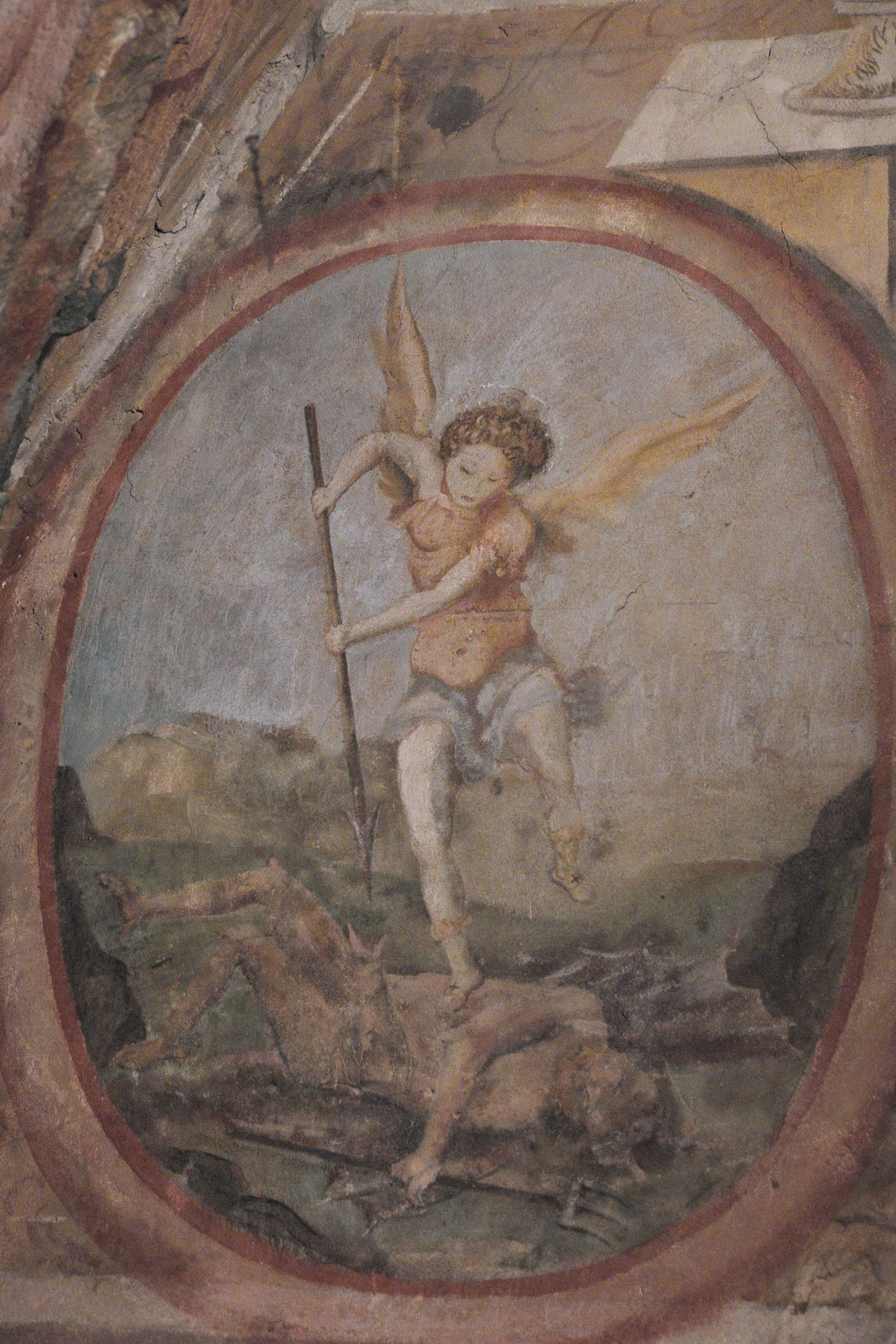 Katholische Pfarrkirche Notre-Dame-de-l'Assomption (Mariä Himmelfahrt) in Boigneville im Département Essonne (Île-de-France/Frankreich), Fresken aus dem 17. Jahrhundert in der Krypta